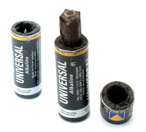 Zn-Mn-Alkali Batterie Urheber des Photos: MiBU (rp) 2004 Nutzungsrechte freigegeben: GNU Free Documentation License.